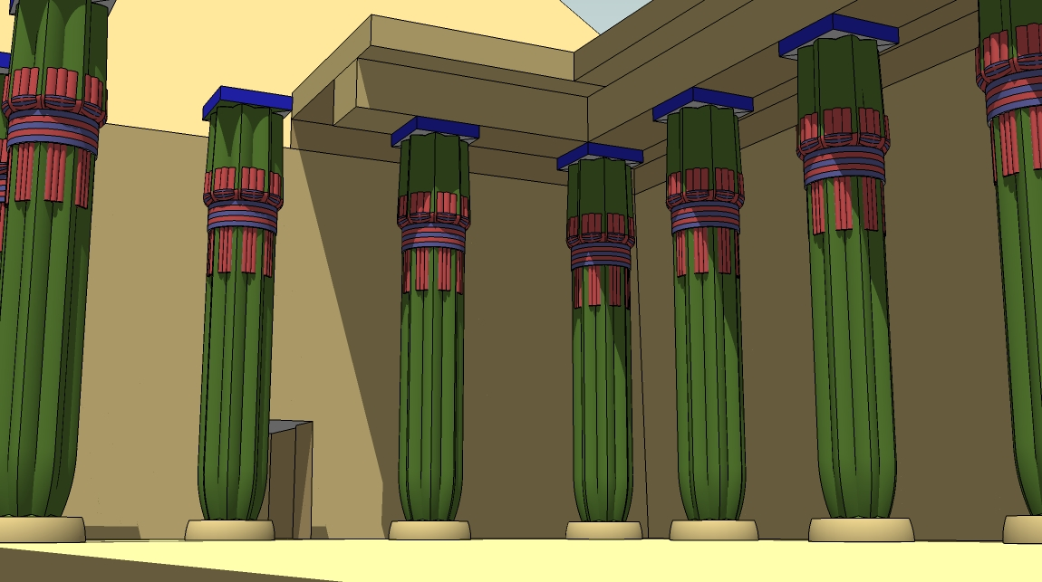 restitution du complexe funéraire d'amenemhat III à Dahchour